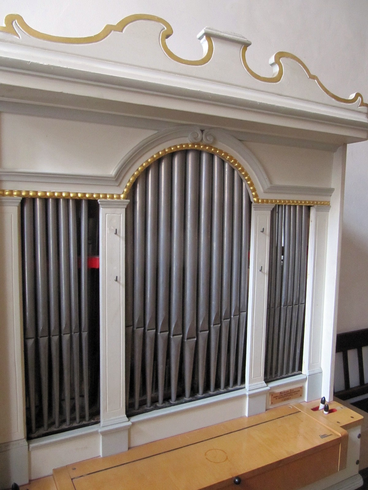 historisches Orgelpositv (Kleinorgel) in der Klosterkirche Weltenburg erbaut von Andreas Fux 1790